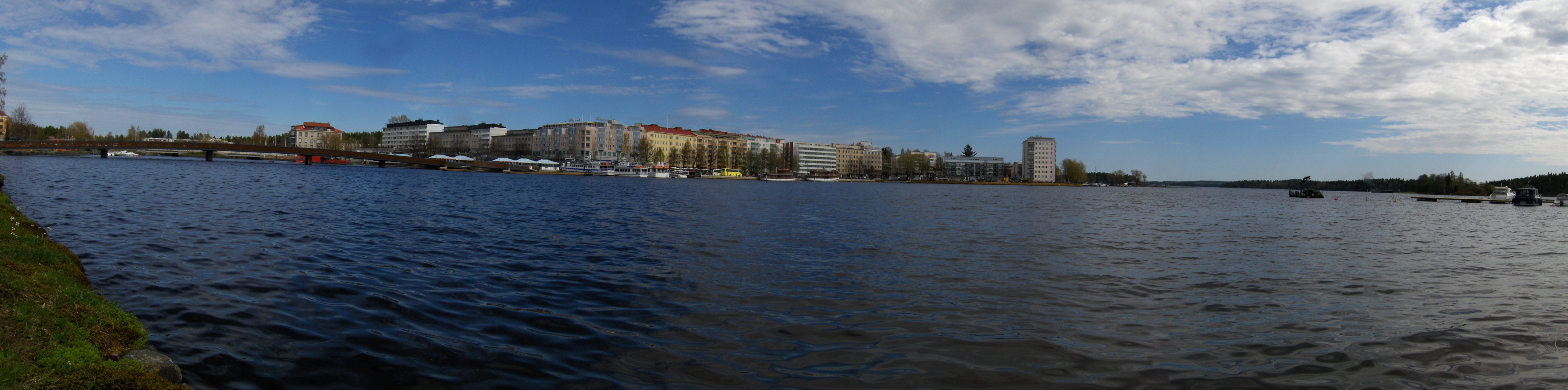 Fotografía panorámica de la zona de Kauppatori en Savonlinna, Finlandia.